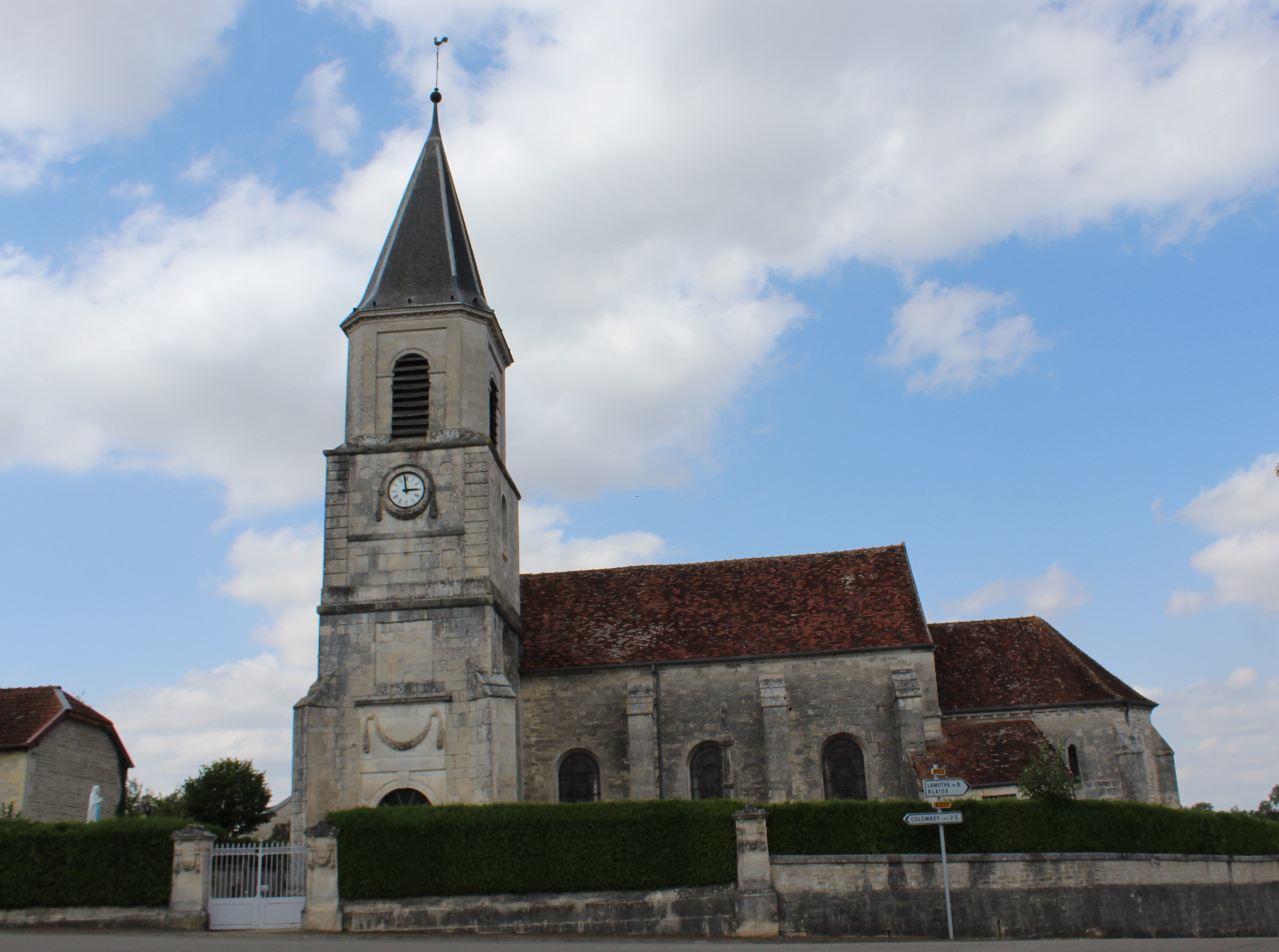 L'église